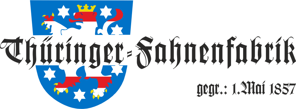 Firmenzeichen